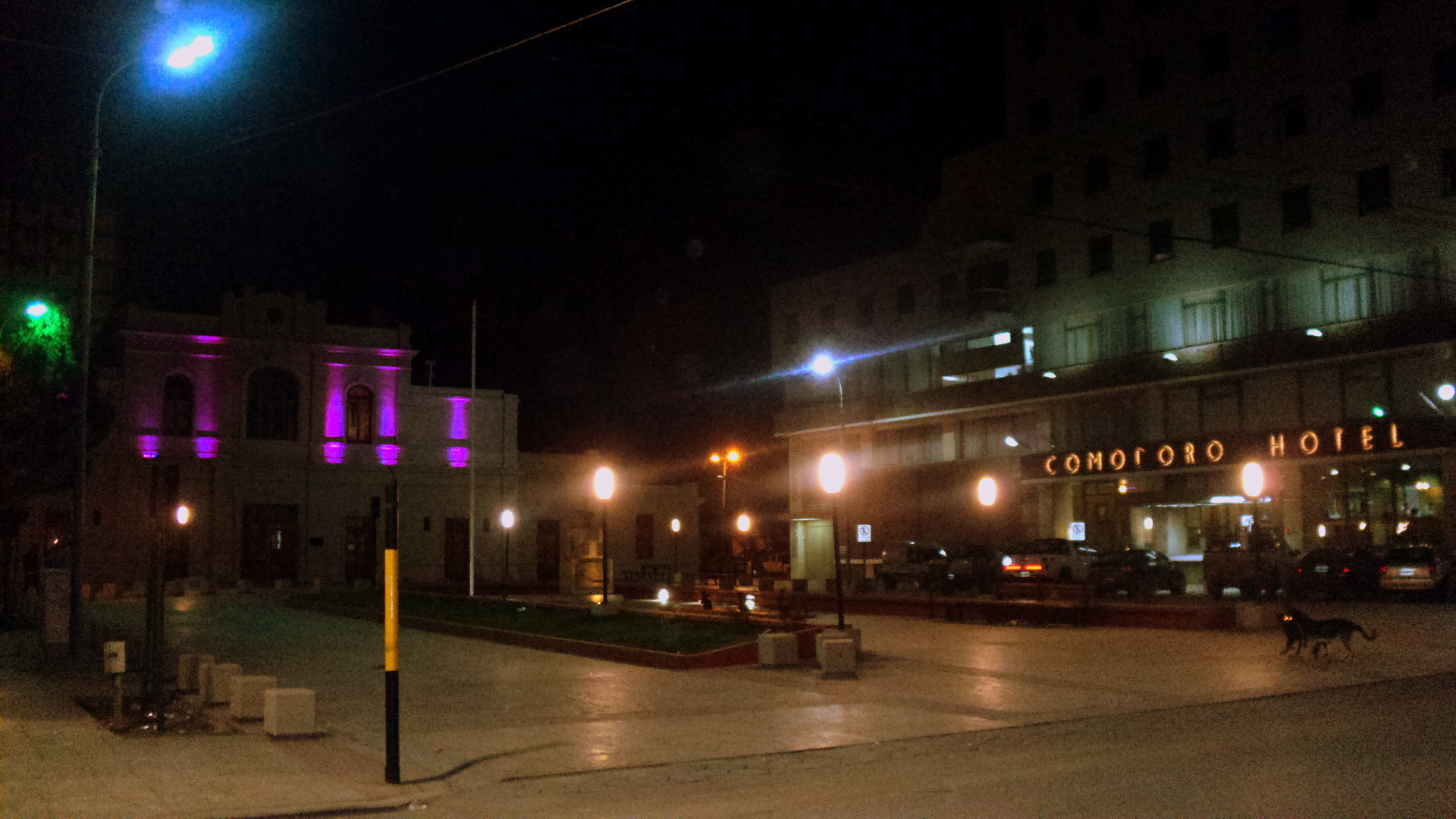 La ex estación tras la restauración con iluminación propia